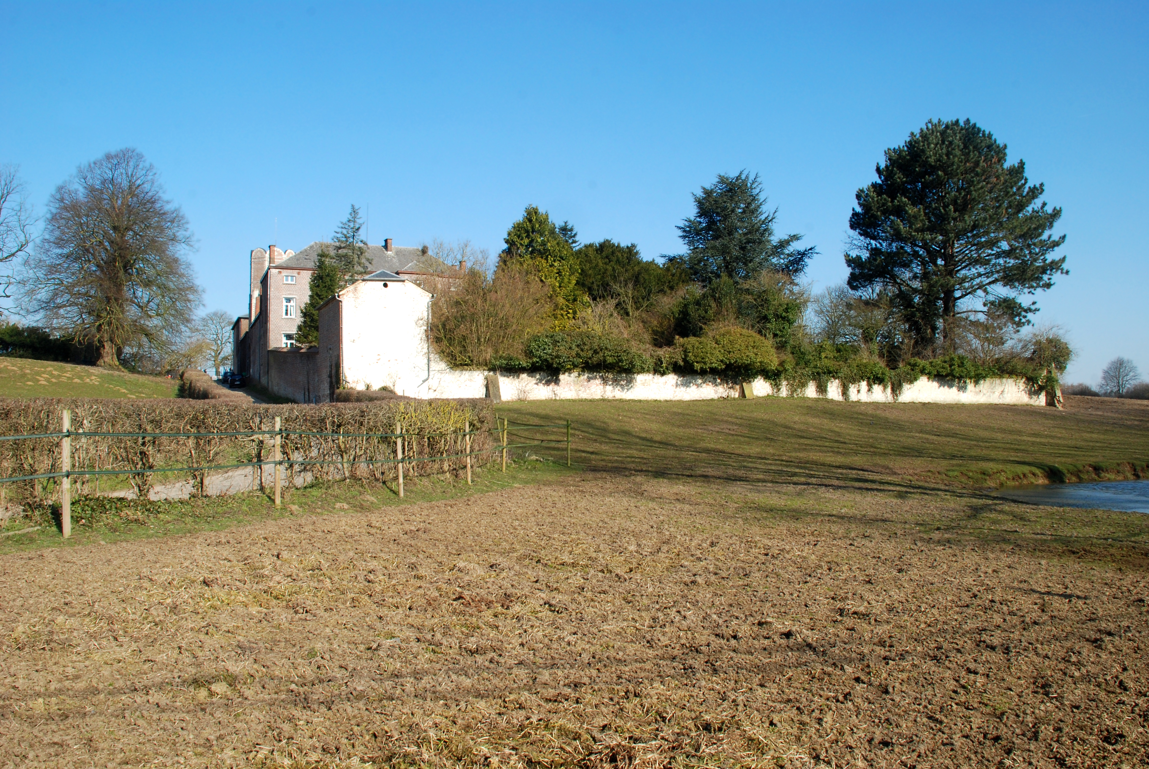 Belgique - Brabant wallon - Site de la bataille de Waterloo - Ferme de la Papelotte